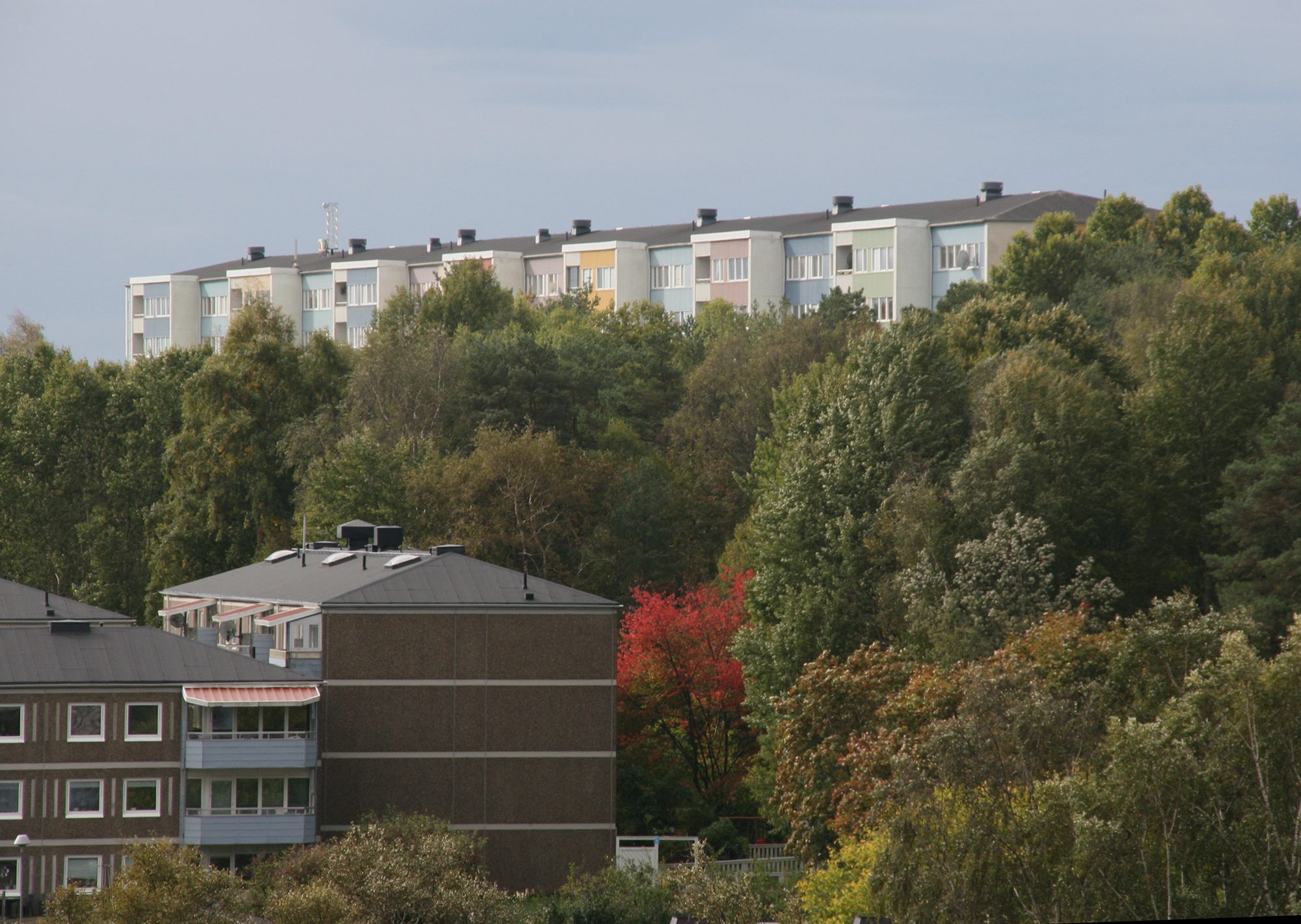 View of the housing estates Siriusgatan (top) and Kvadrantgatan (bottom) seen from Teleskopgatan. Bergsjön, Göteborg.